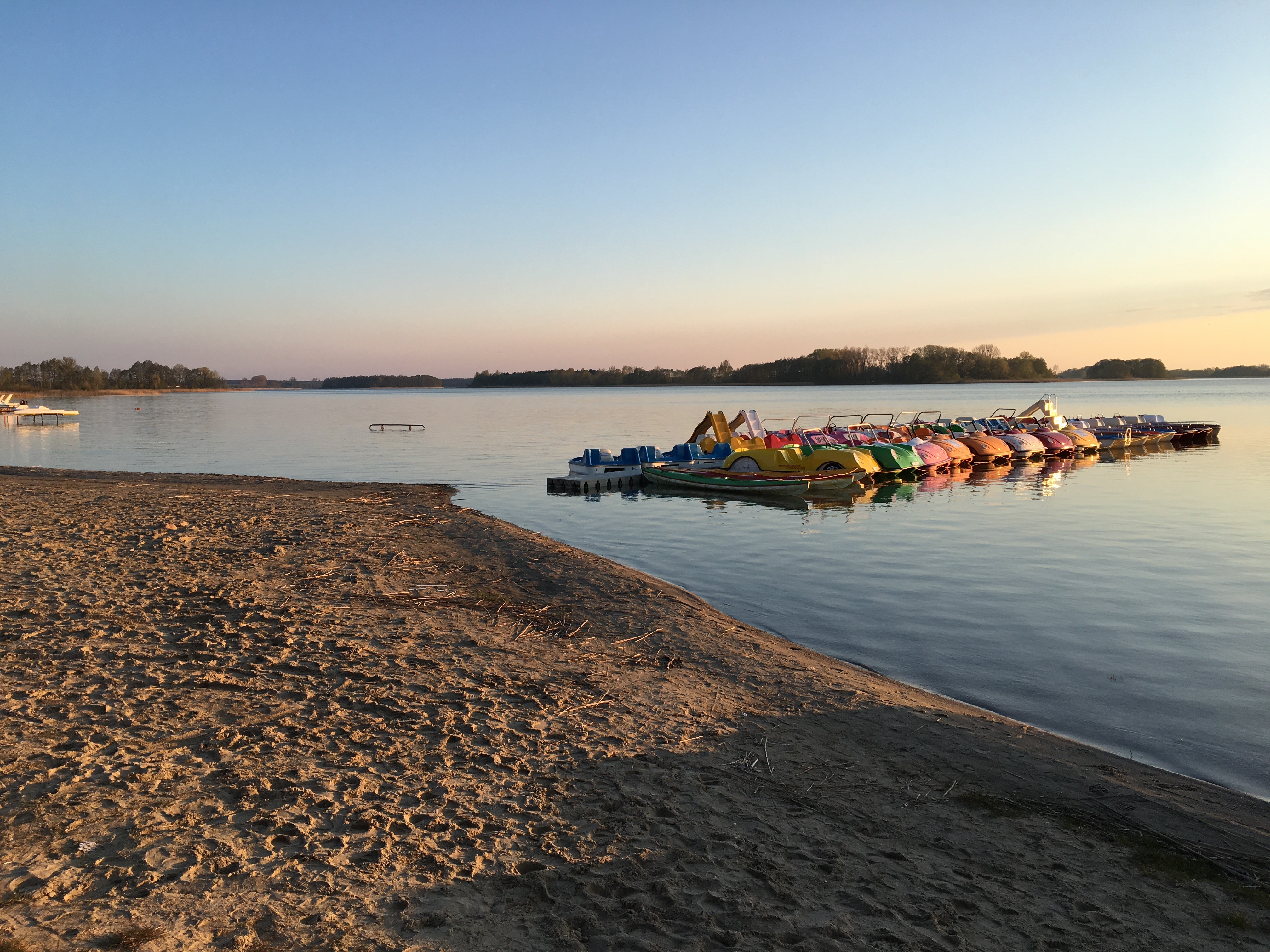 Plaża, jezioro i rowerki wodne na jeziorze w Skorzęcinie